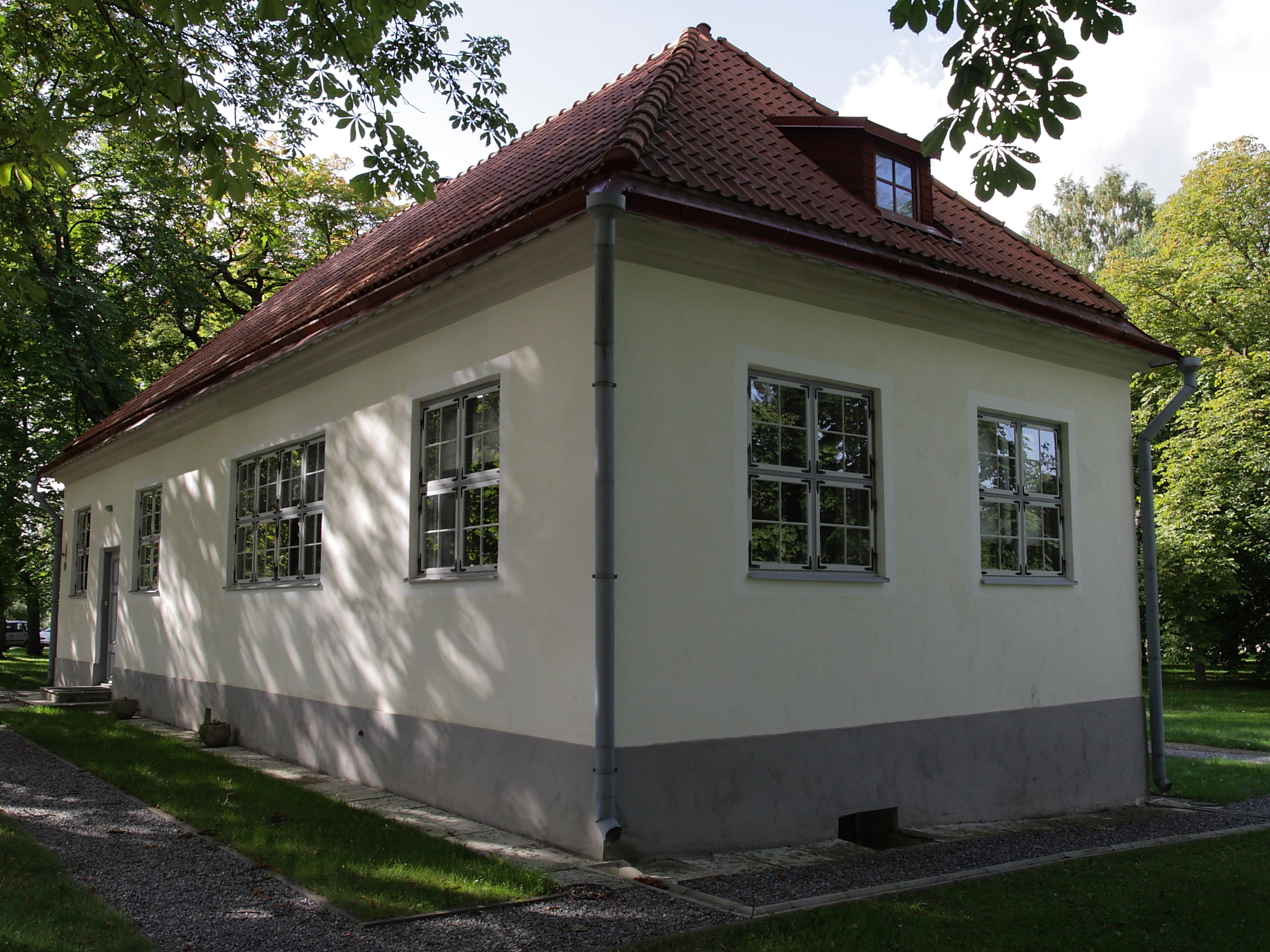 Tallinna Peeter I maja